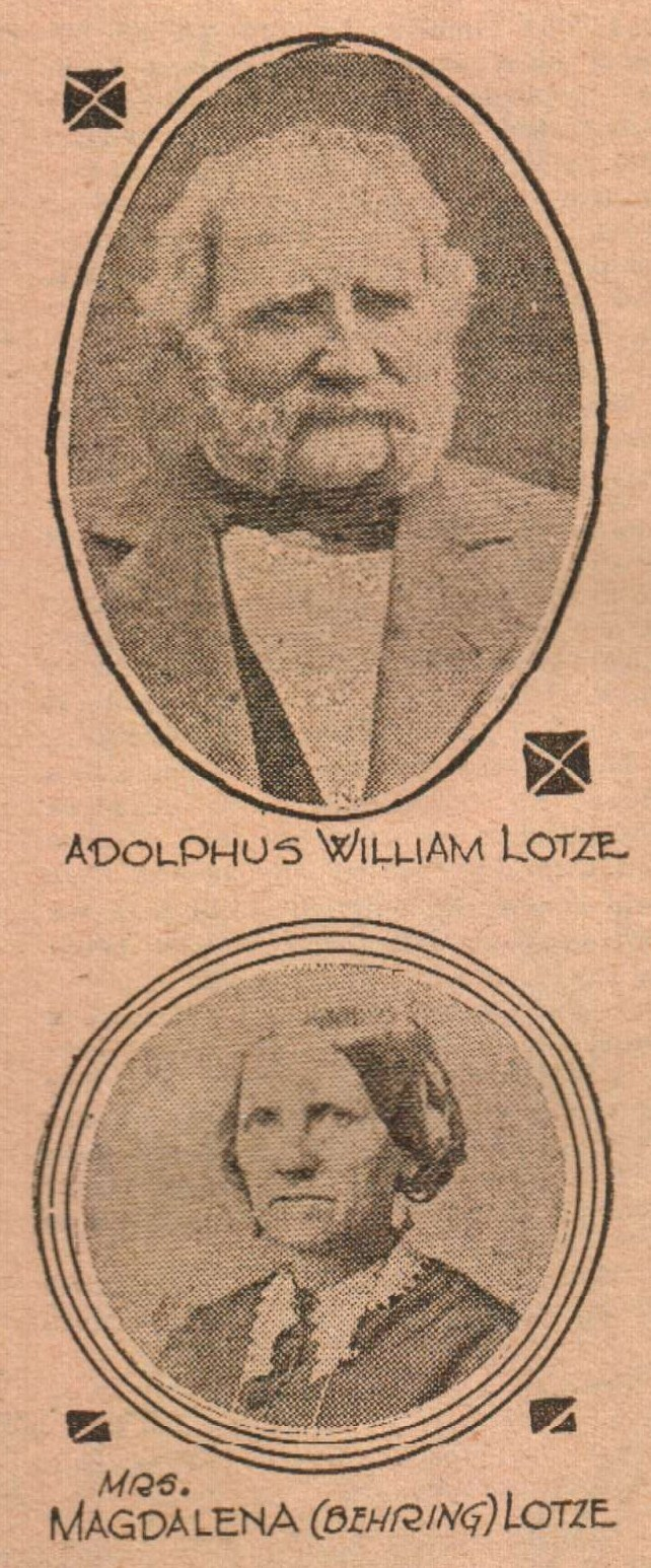 Adolphus Lotze & Magdalena Bering. Bild wurde vor 1875 aufgenommen. Es handelt sich um ein Privatbild.